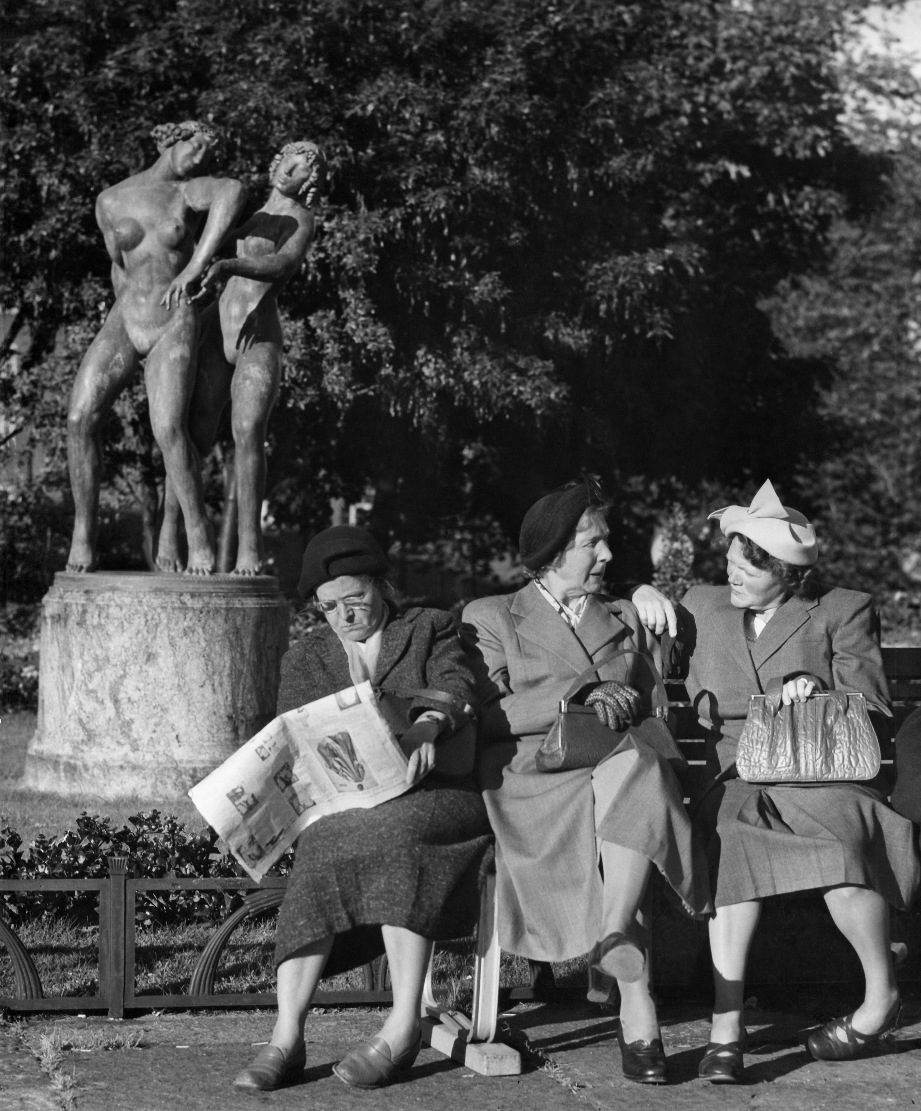 Tre kvinnor sitter på en bänk vid Götaplatsen i Göteborg, två av dem samtalar medan den tredje läser tidningen. I bakgrunden Carl Milles staty Danserskorna. Ämnesord: Kläder : Accessoarer och tillbehör, Kläder : Damkläder, Konst : Skulptur, Kvinna, Massmedia, Stad, Torg.